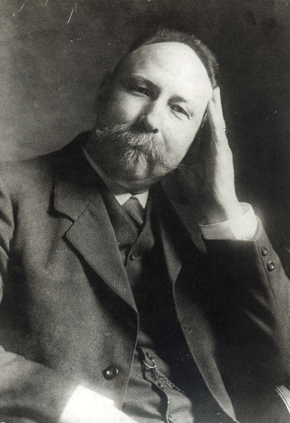 Anton Geiß (11. August 1858 in Rettenbach; 3. März 1944 in Schriesheim), deutscher Politiker der SPD in Baden, erster badischer Staatspräsident